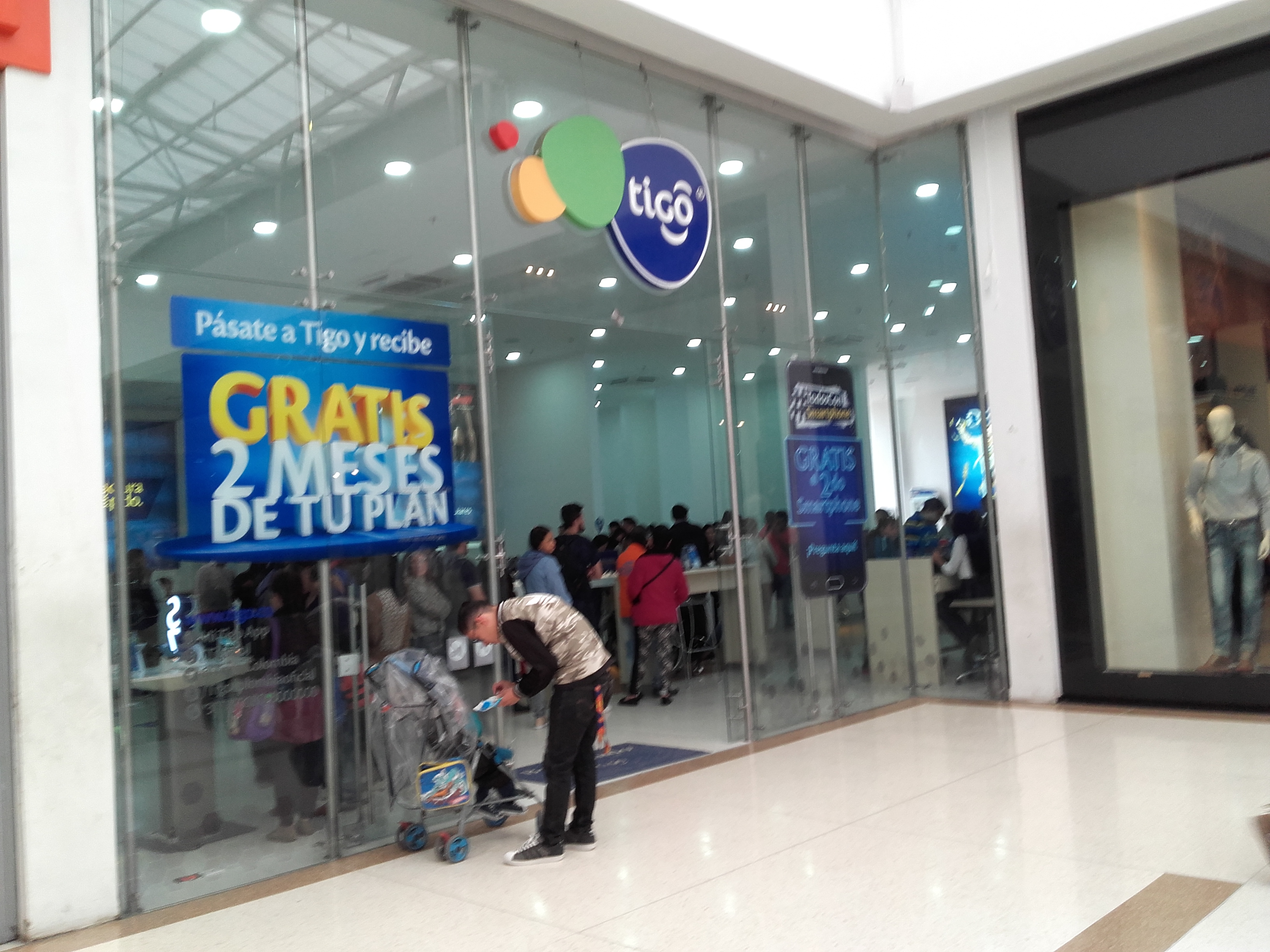 kdndkdndkdkdm